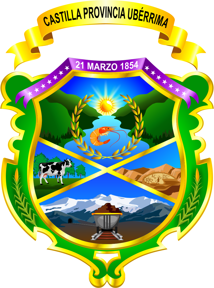 Distrito de Aplao - Provincia de Castilla - Región Arequipa